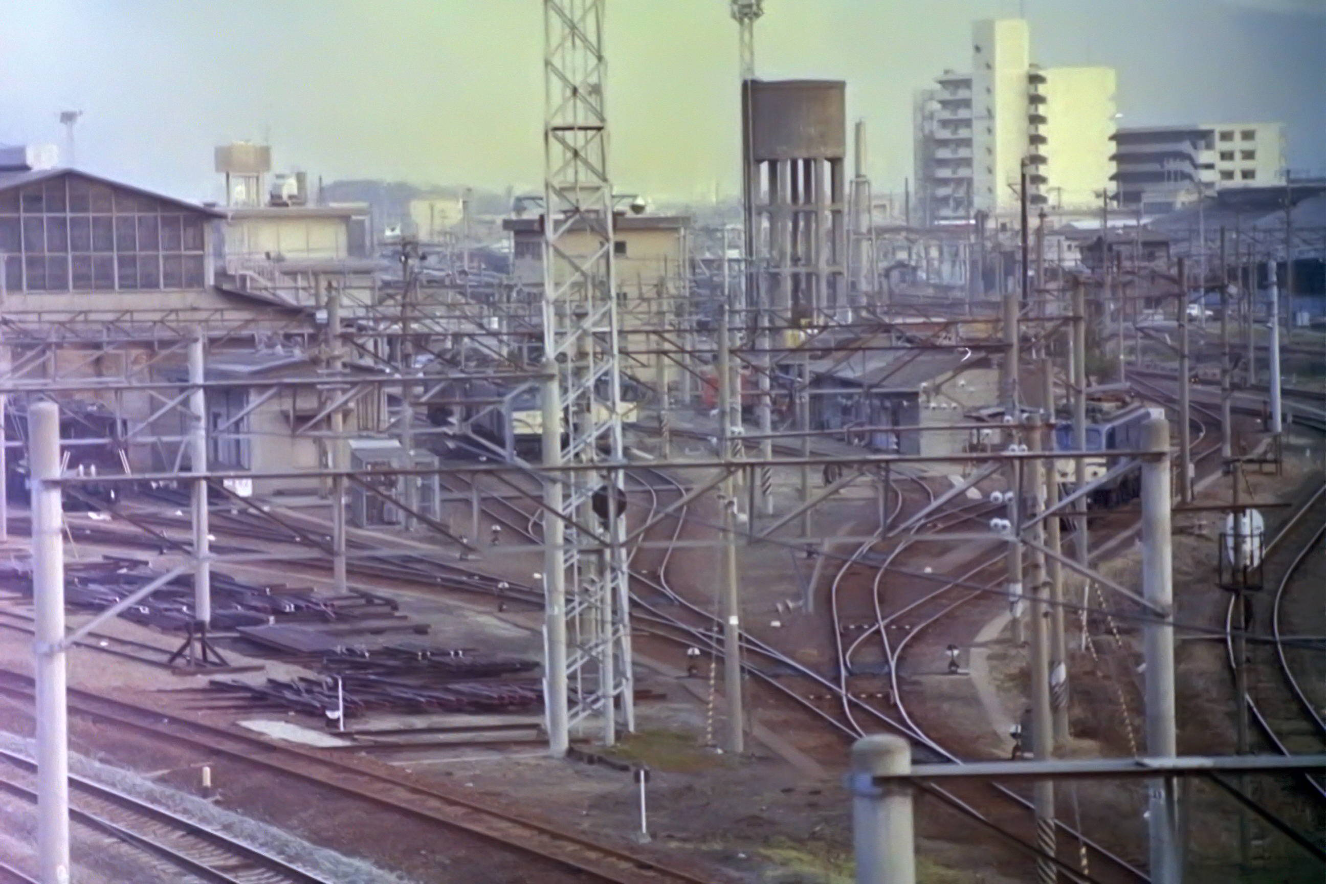 竜華機関区 1984年